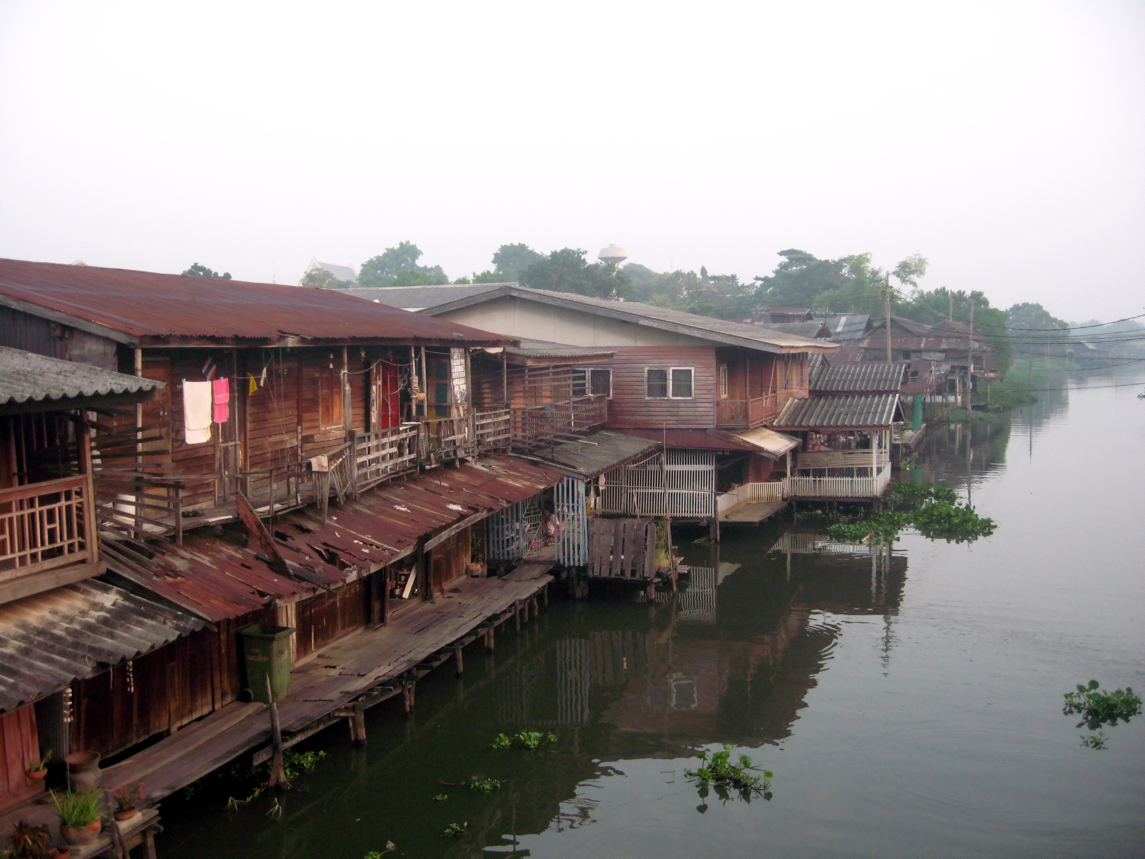 บ้านริมคลอง